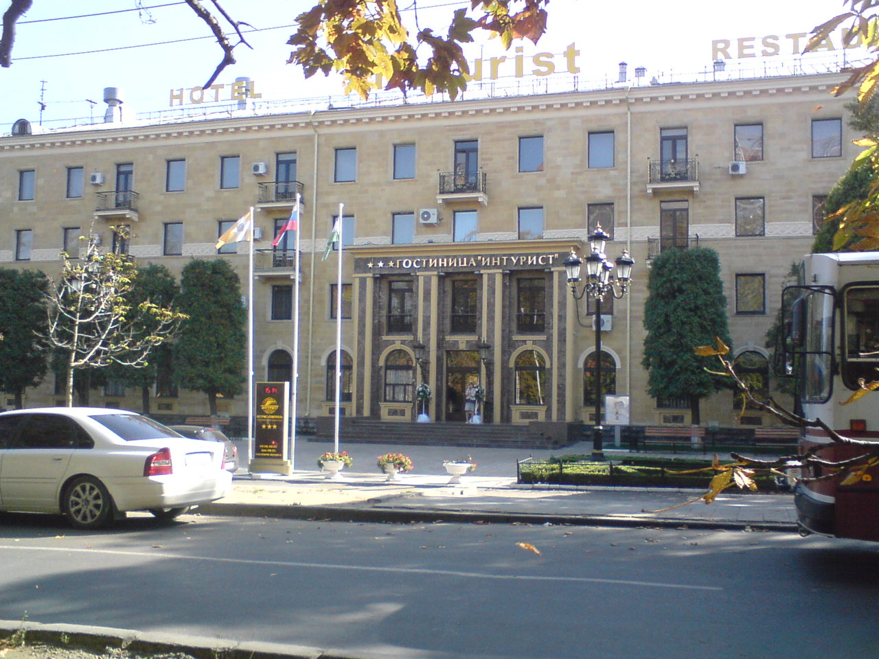 Вид на фасад гостиницы с аллеи проспекта Карла Маркса